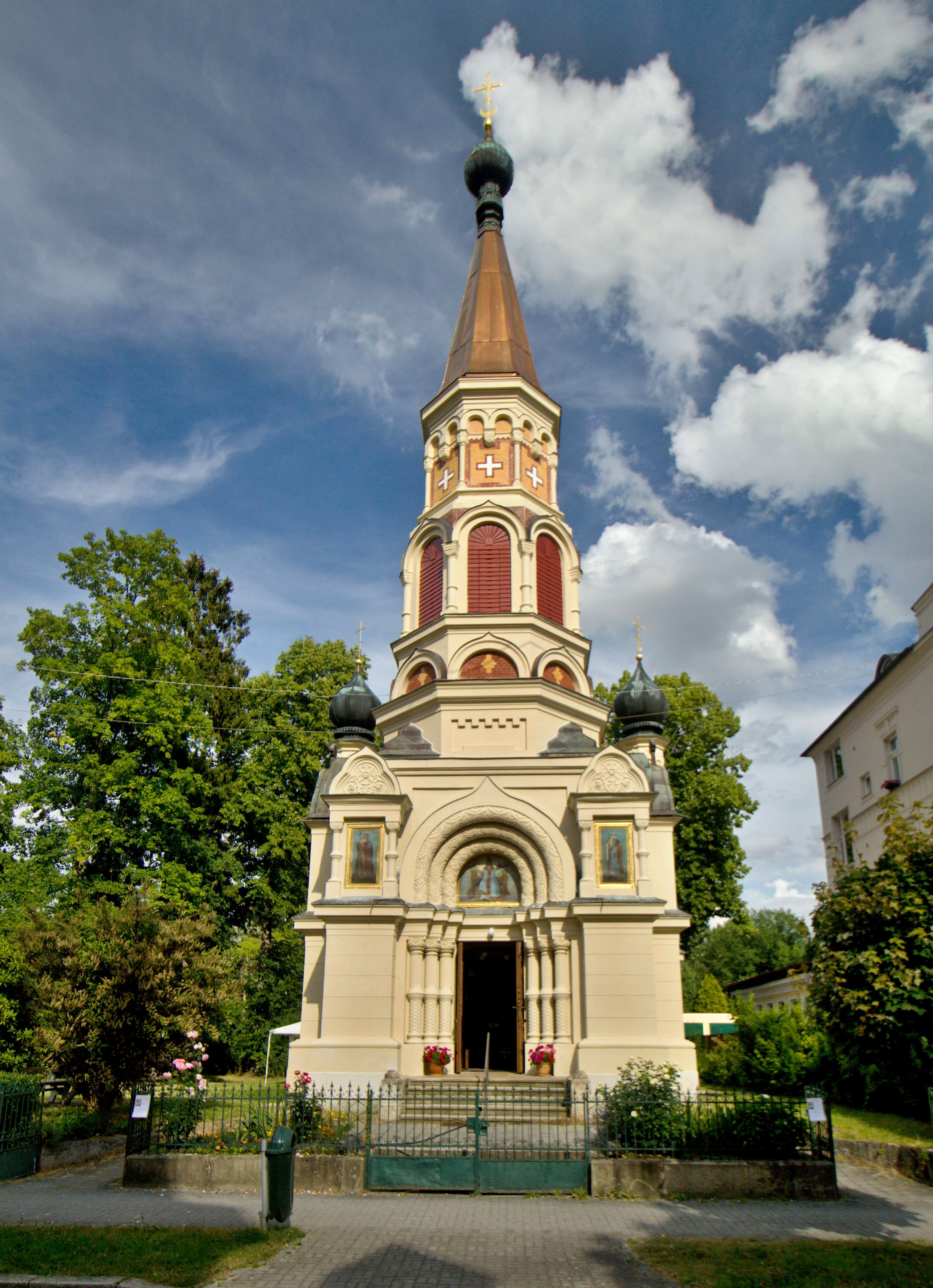 Františkovy Lázně chrám sv. Olgy